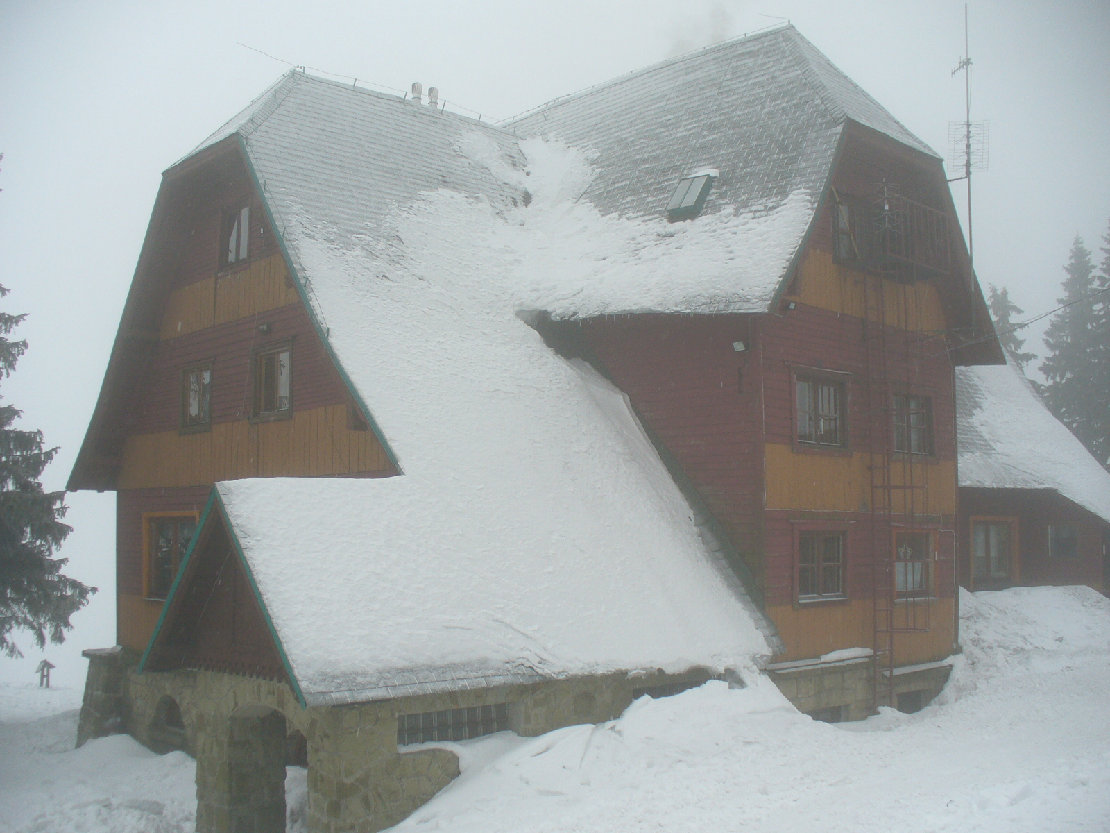 Schronisko na Hali Rysiance